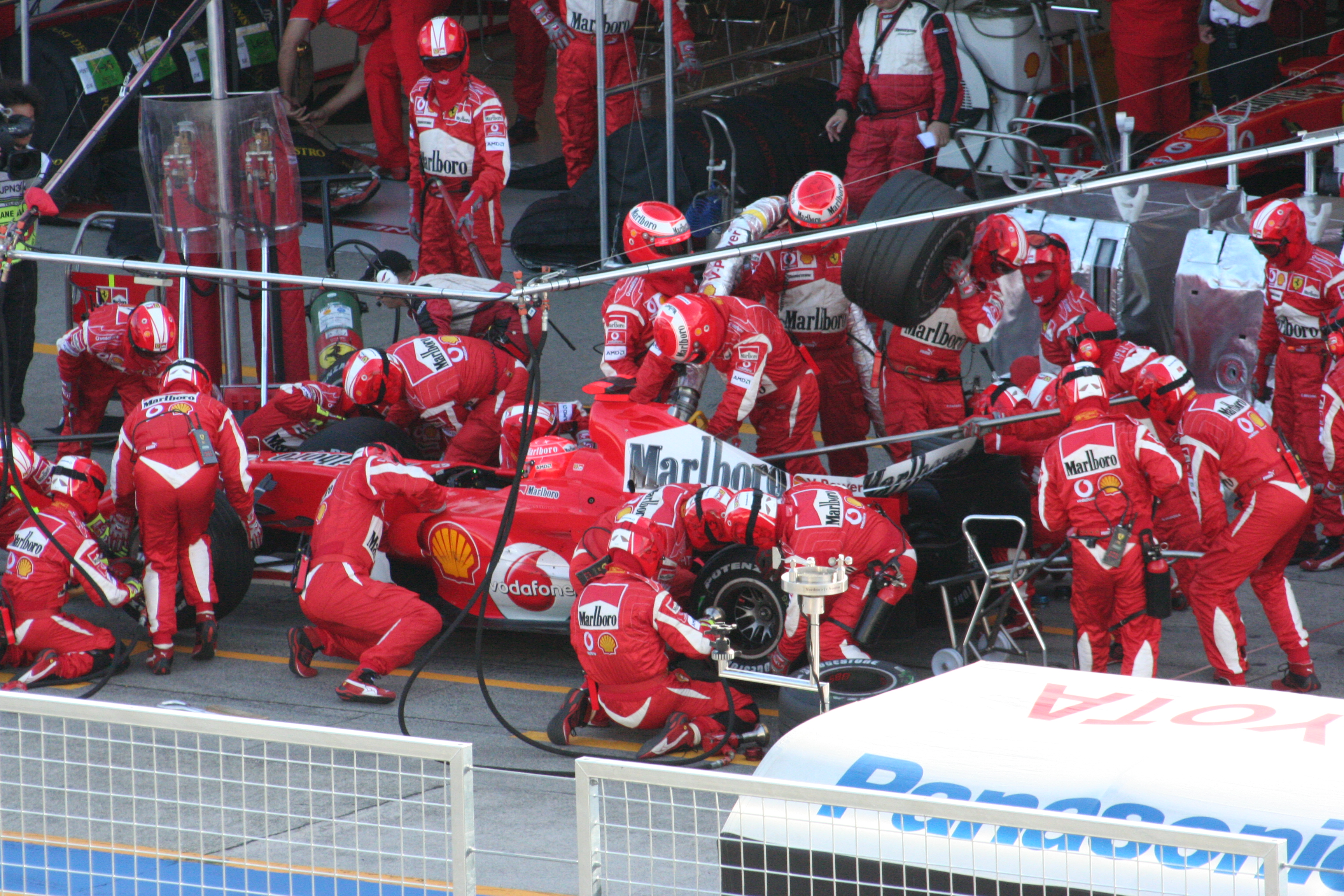 Scuderia Ferrari Pit Stop(Michael Schumacher) in 2006 Japanese Grand Prix